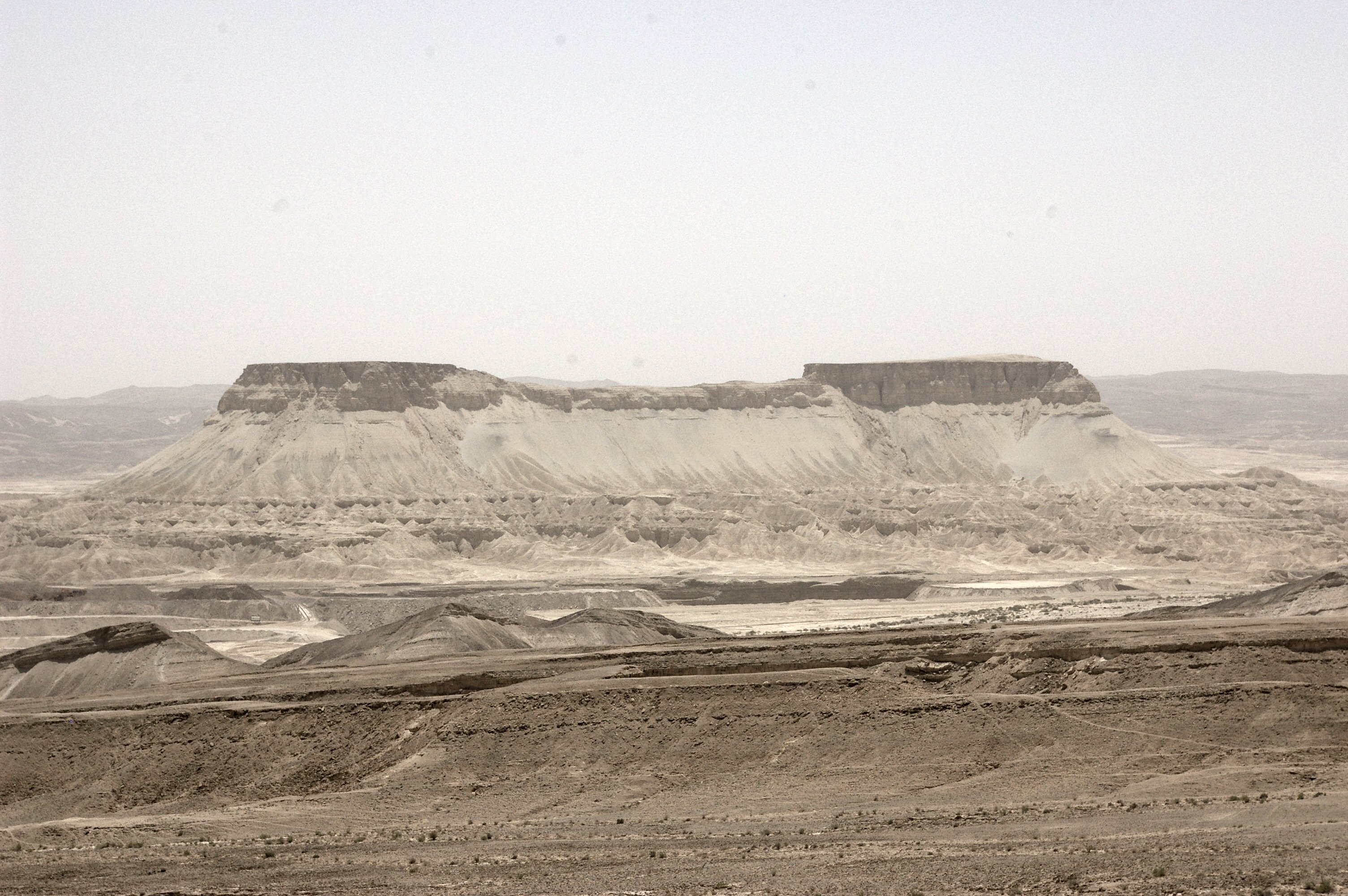 ZIN (TSIN) mount, Negev, Israel